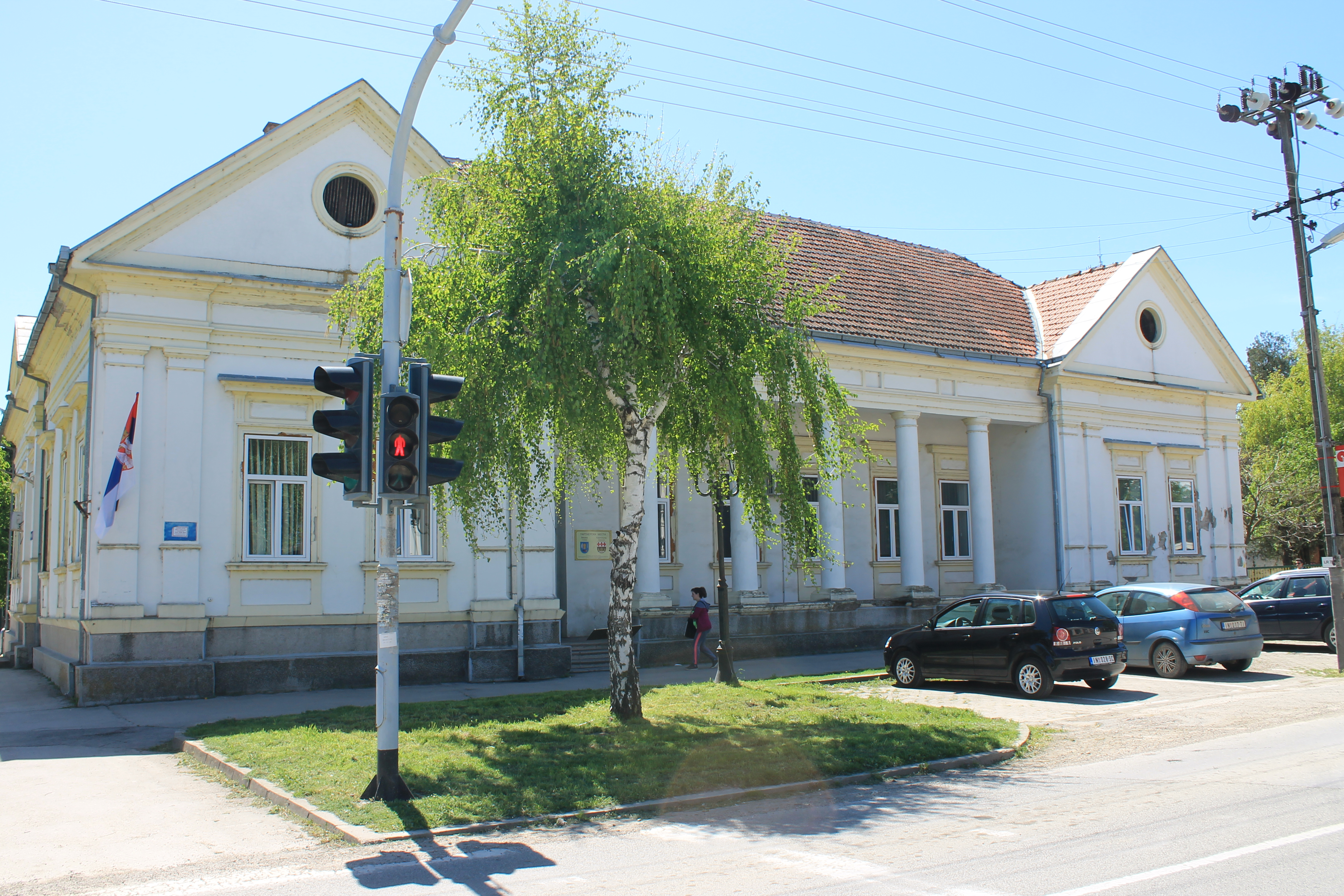 Beška